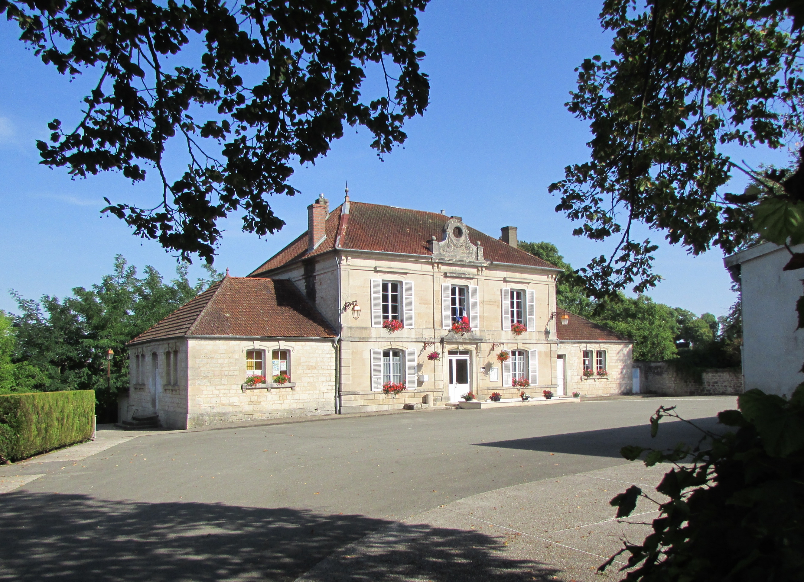 La mairie.